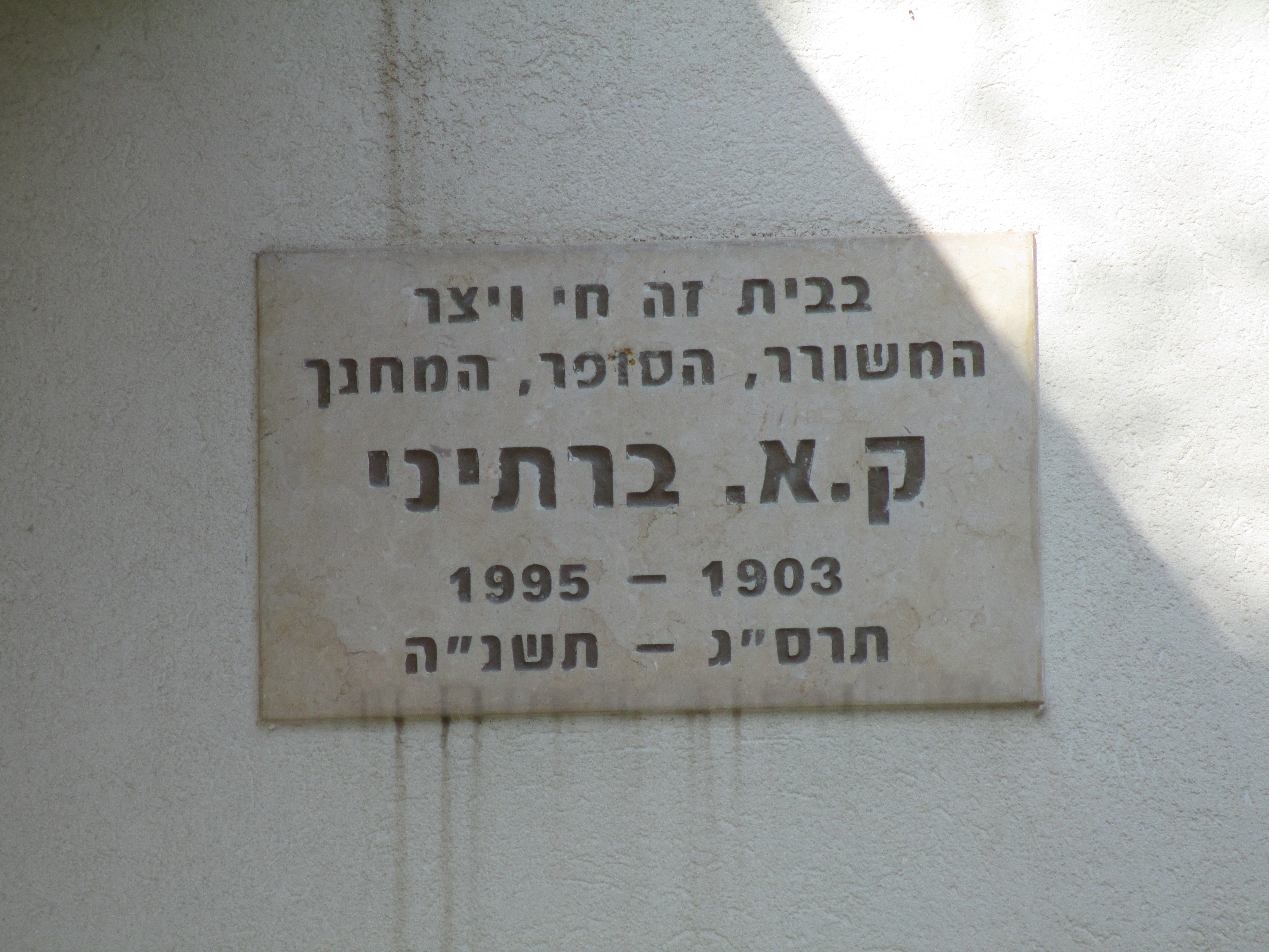 לוחית זיכרון לק.א ברתיני בתל אביב